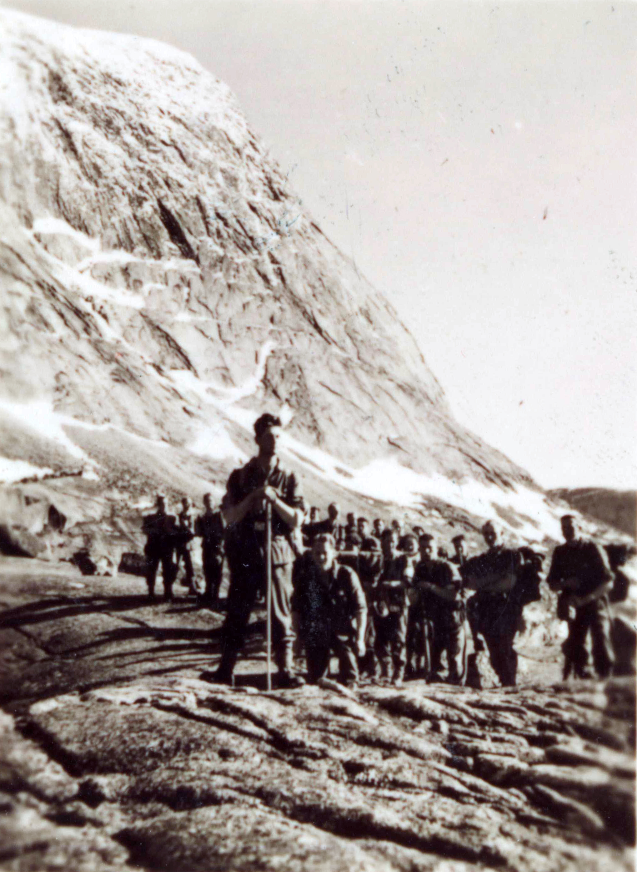 Fjell i Hellemobotn Tittel / Title: Bøffelmarsjen 2-13. juni Dato / Date: Juni, 1940 Fotograf / Photographer: Rudi Margreiter Sted / Place: Hellemobotn, Nordland, Norge Eier / Owner Institution: Arkiv i Nordland Lenke / Link: Arkiv i Nordland Arkivreferanse /Archive reference: AIN.NA143.0080 Fra Dag Skogheims Privatarkiv Tekst bak på bildet: Der strosstrupp über Hellemobotn